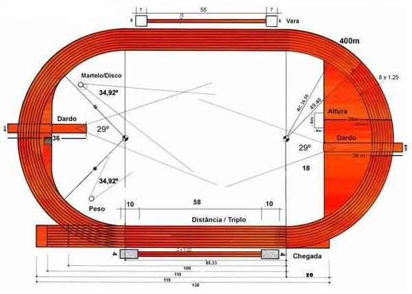 Dimenções de uma pista oficial de atletismo